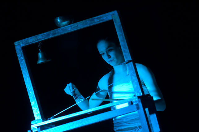 Snímek z inscenace "Faust a Markétka" autora Johanna Wolfganga Goetheho v režii Pavla Kheka. Na snímku Veronika Kubařová.